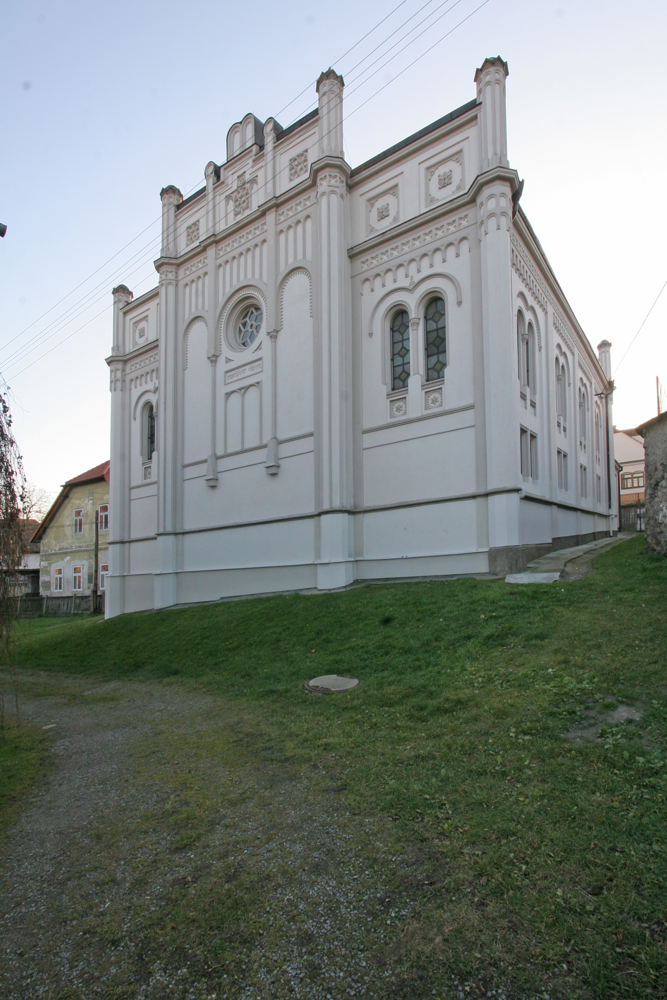 Židovský dům - židovská čtvrť, synagoga a soubor domů (Golčův Jeníkov), ghetto, Golčův Jeníkov